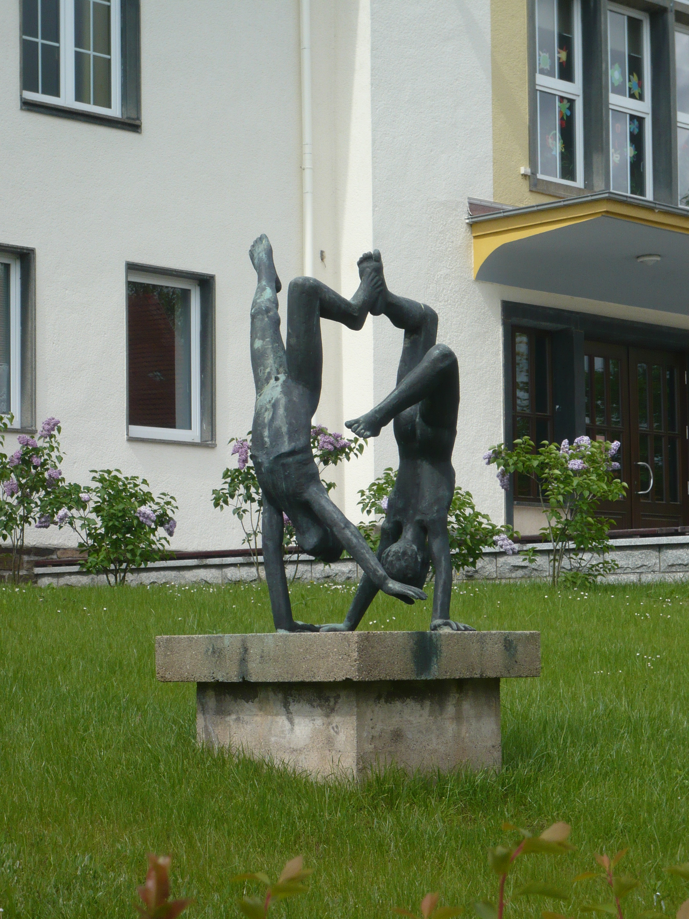 Stadt Aue, Bronzeskulptur „Turnende Kinder“